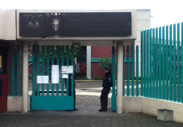 Sistema de Bachillerato del Gobierno del Distrito Federal. Instituto de Educación Media Superior (IEMS)